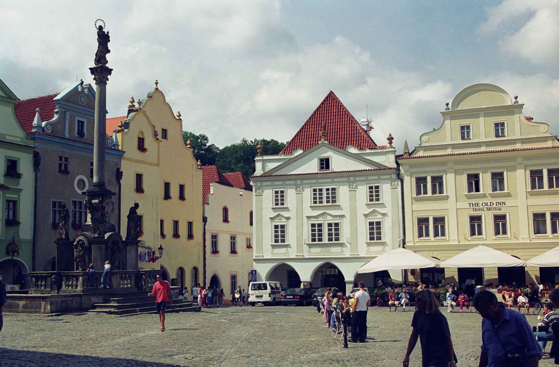 Český Krumlov